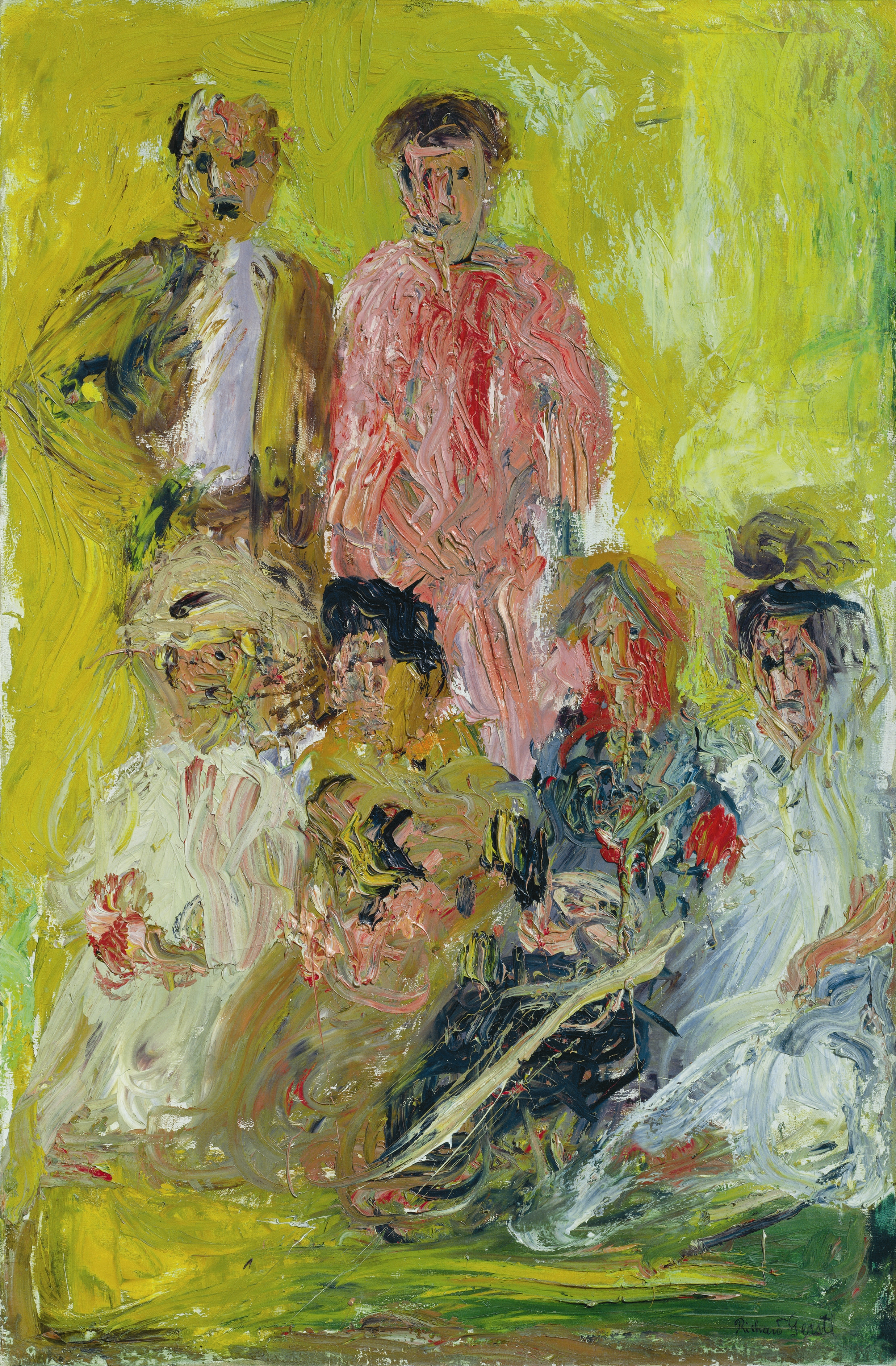 Öl auf Leinwand